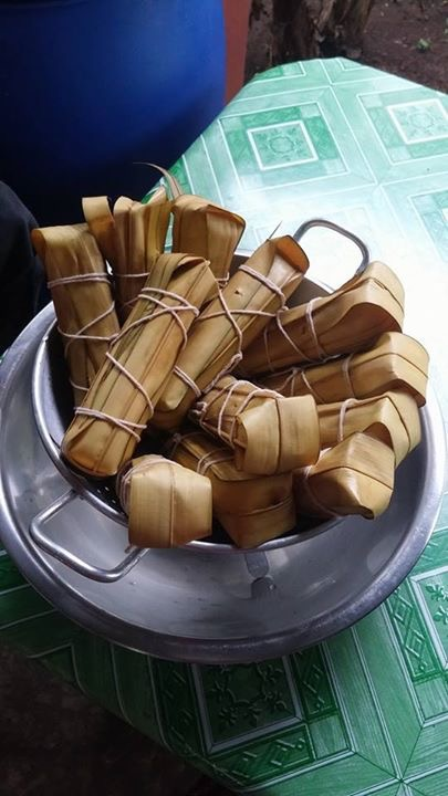 Bollo envuelto en hojas de cañas